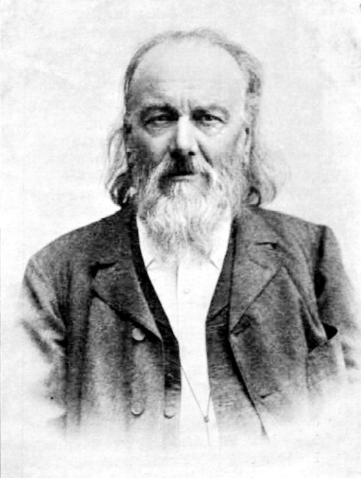 Zsolnay Vilmos (1828–1900) keramikusművész, gyártulajdonos portréja. Zelesny Károly fényképfelvétele (1900)